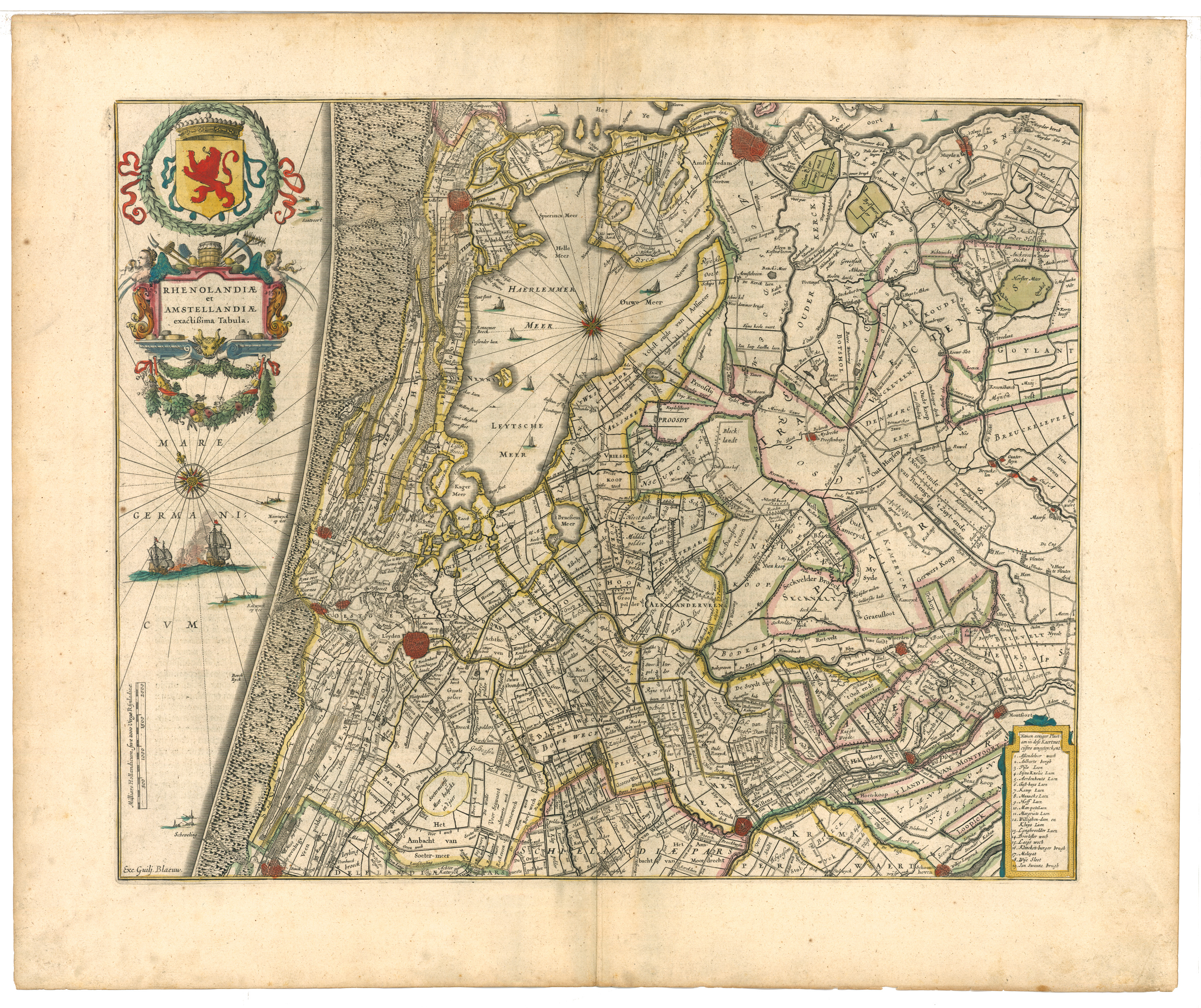 Rhenolandiæ et Amstellandiæ exactiqima Tabula (nauwkeurige kaart van Rijnland en Amstelland)